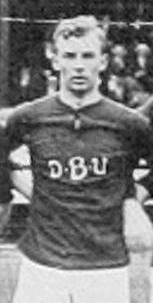 Poul Nielsen na OI 1912.